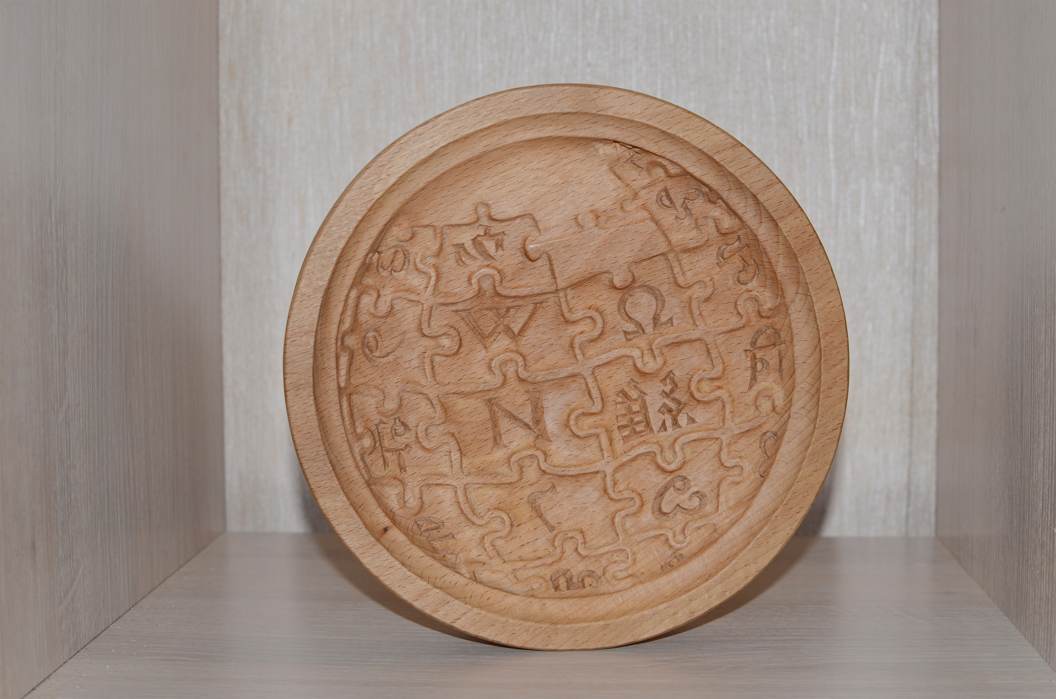 Пряничная доска, созданная в 2017 году.